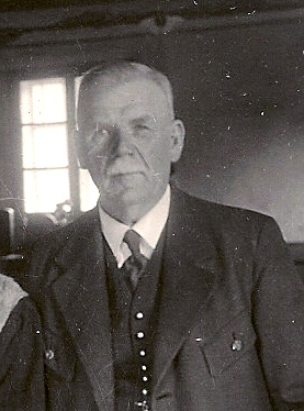 Porträtfoto Josef Rainer